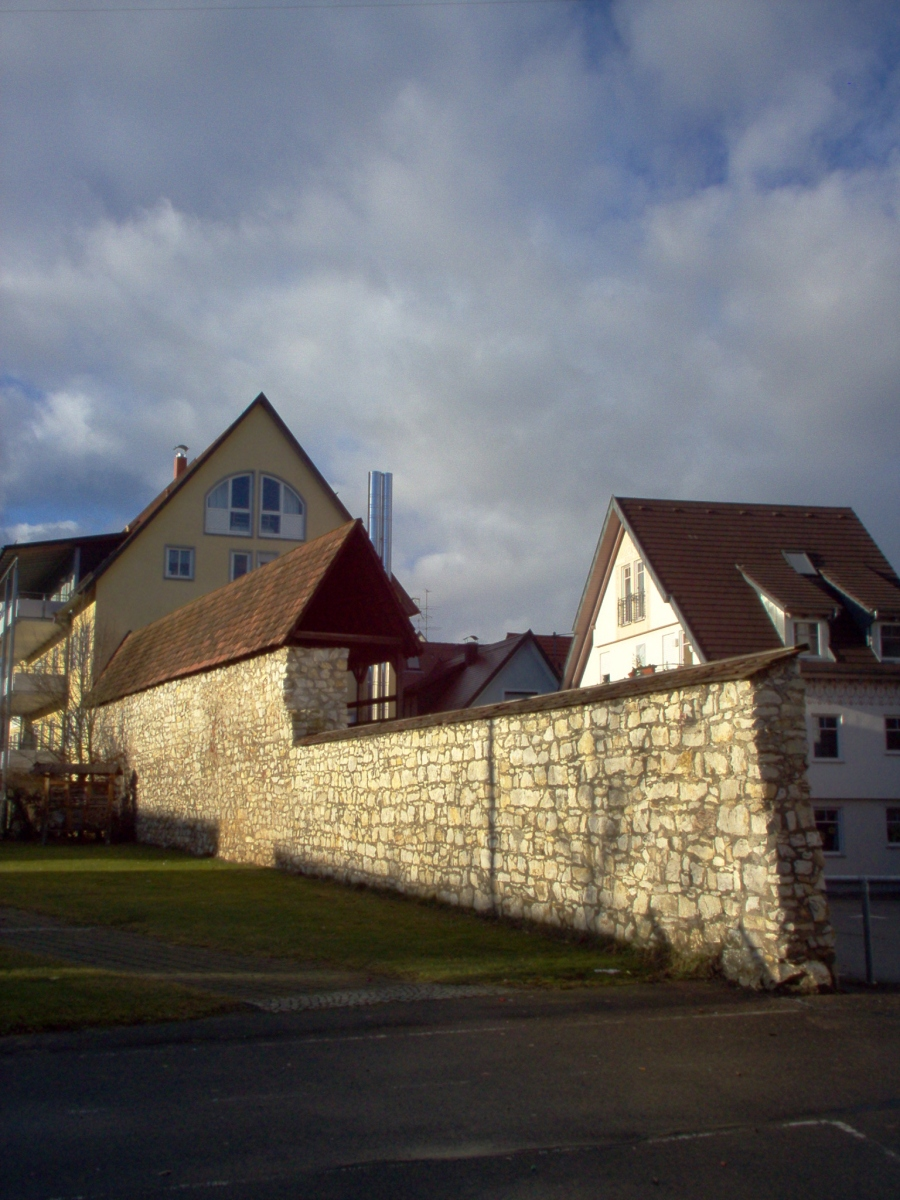 Mengen, Reste der Stadtmauer, rests of City wall